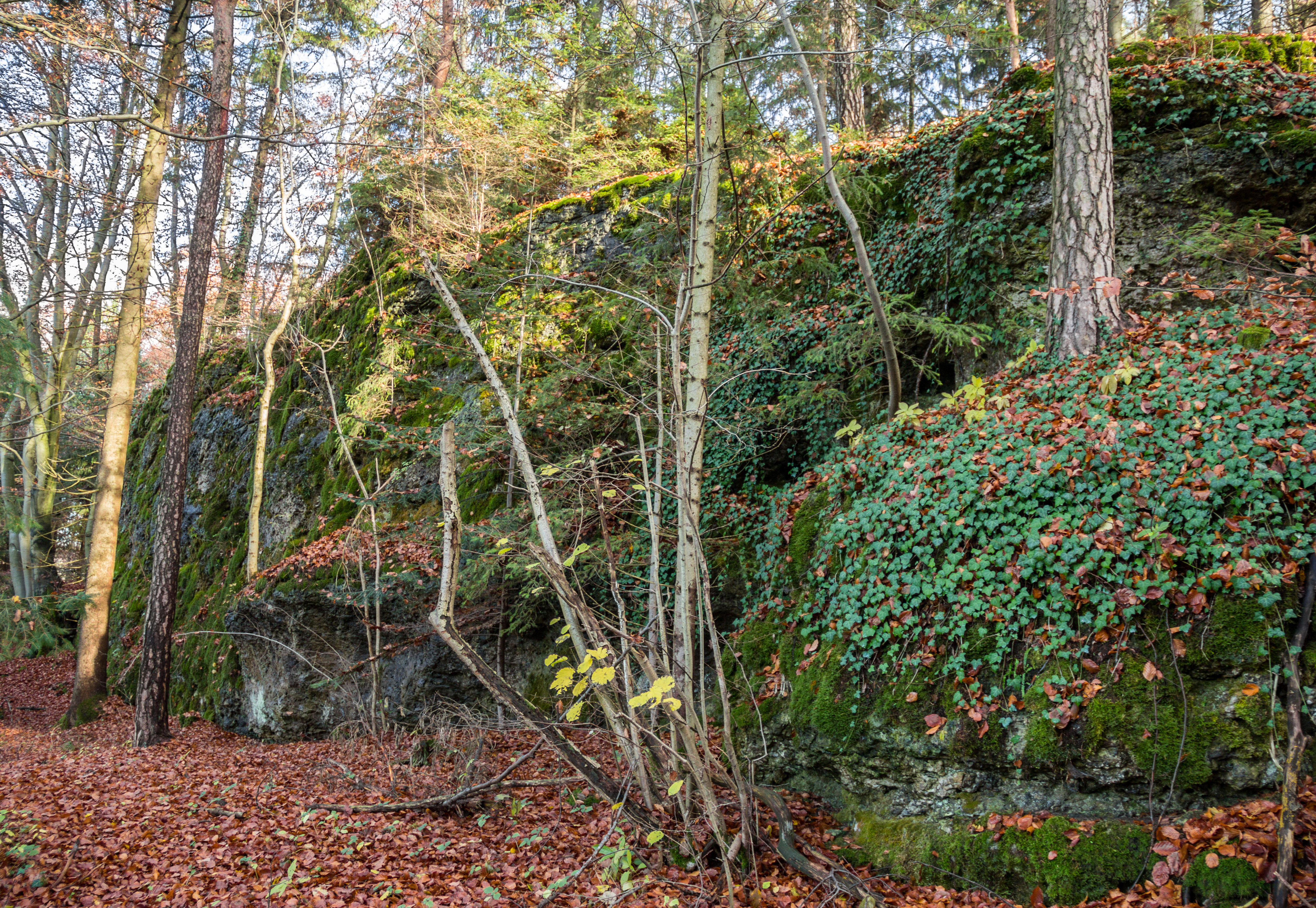 Felsen, Affalterthal, Geotop